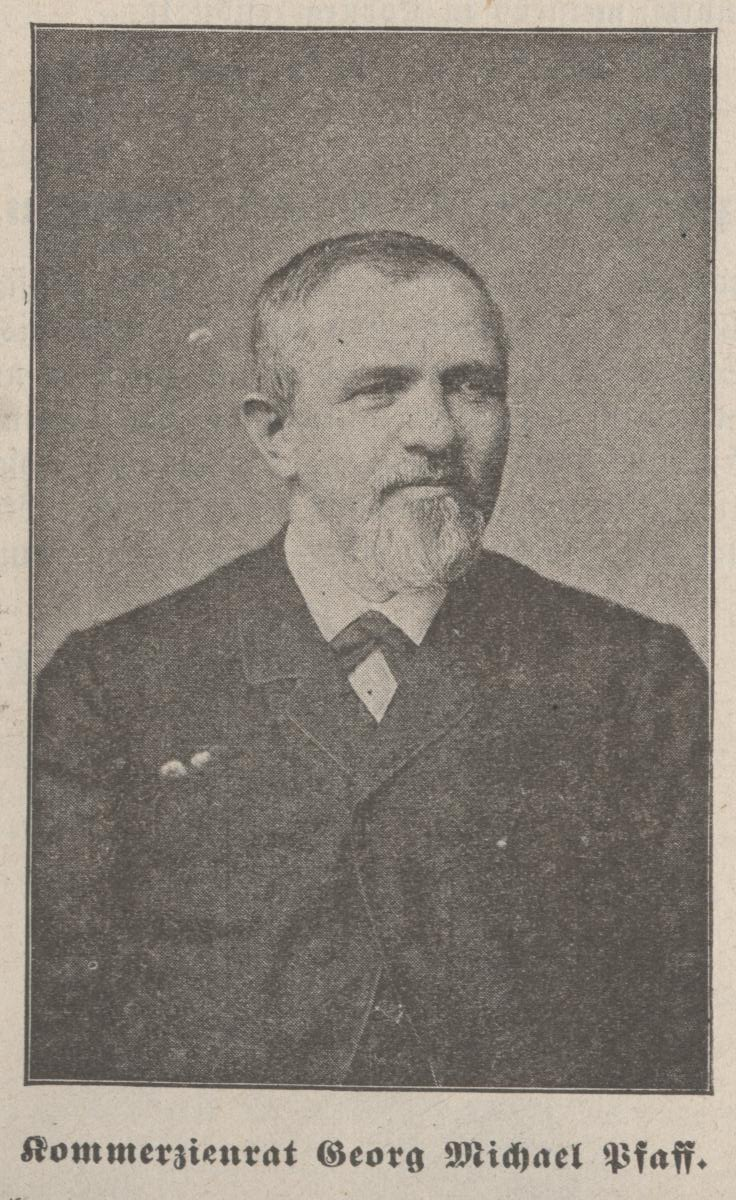 Georg Michael Pfaff, Unternehmer, Kaiserslautern